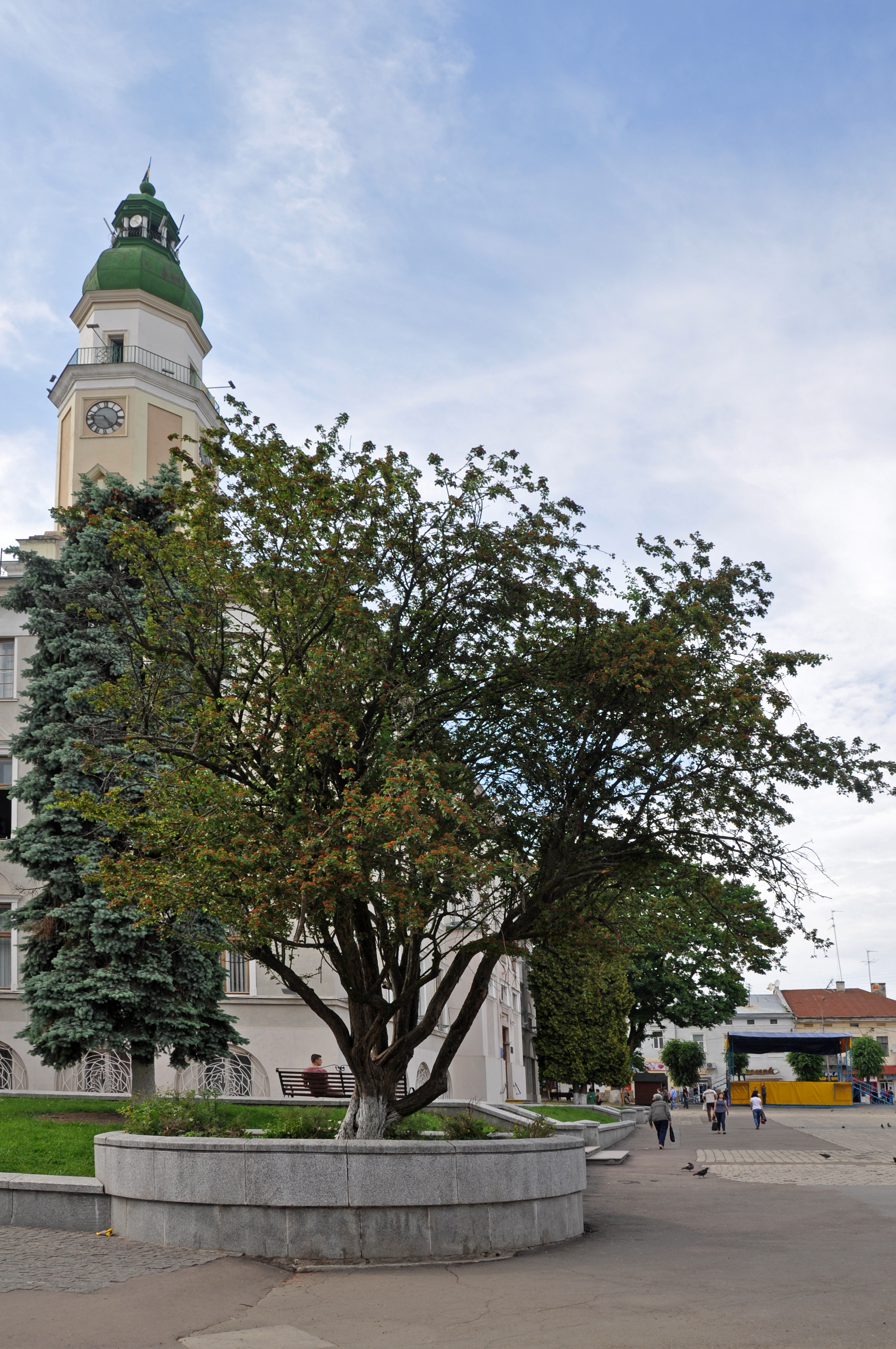 Група магнолій, м. Дрогобич, пл. Ринок